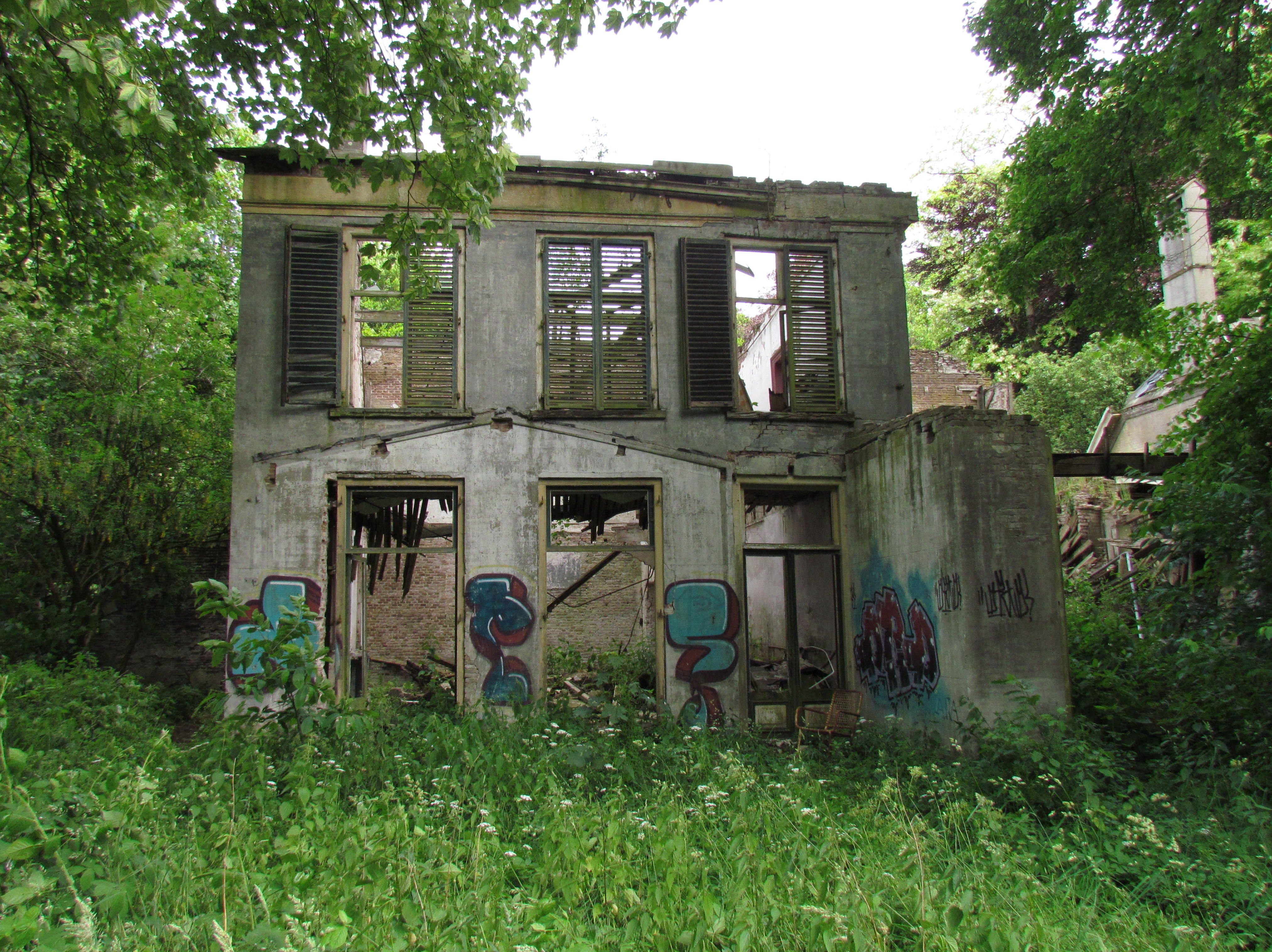 De ruïne van het voormalig hotel Dullemond in Laag-Soeren, leegstaand sinds de jaren zeventig van de twintigste eeuw